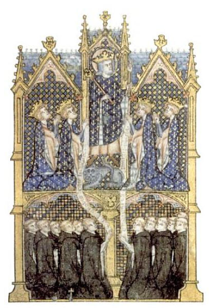 Enluminure de Philippe le Bel, ses trois fils et les écoliers